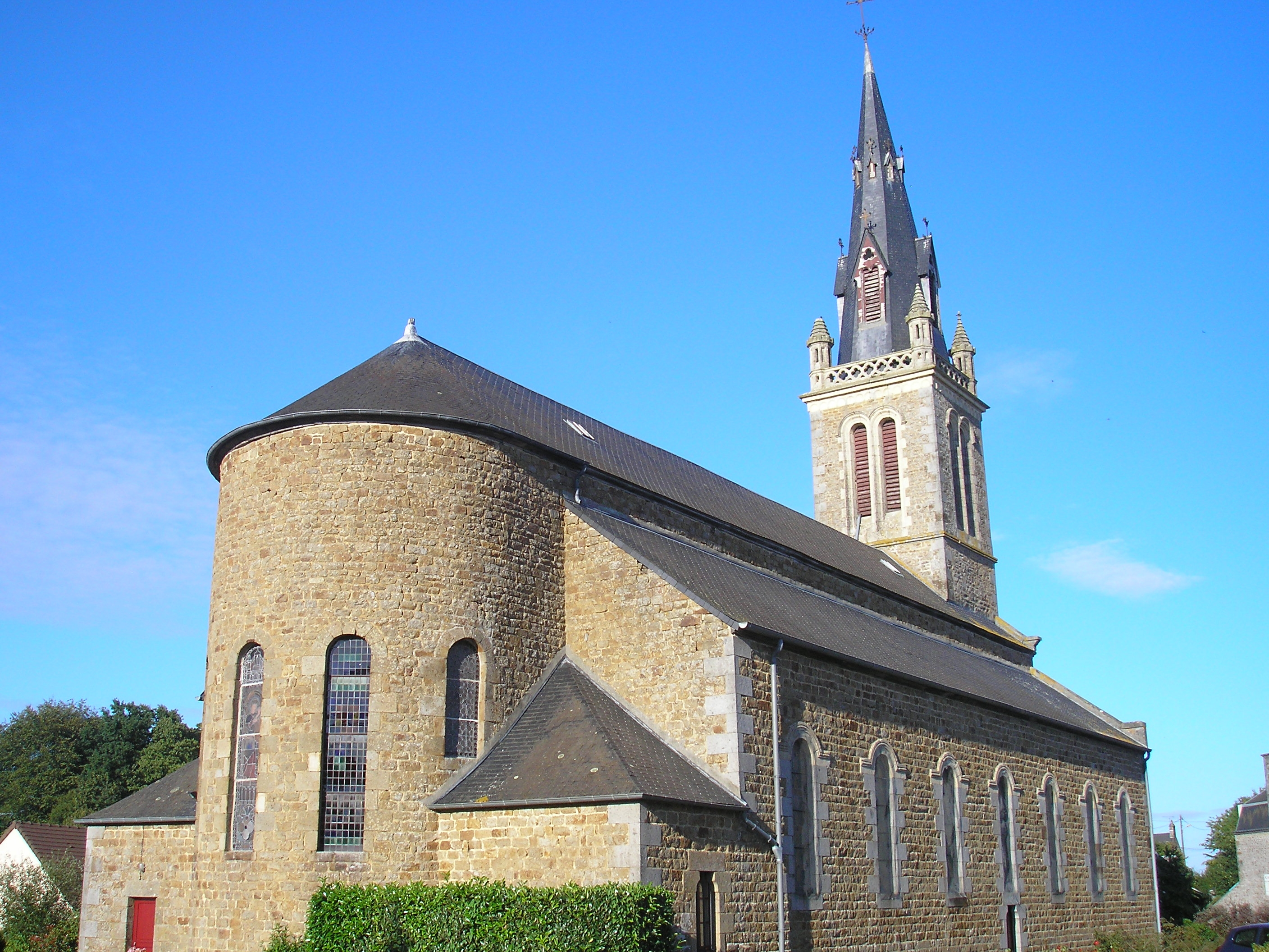 Ségrie-Fontaine (Normandie, France). L'église Sainte-Anne.